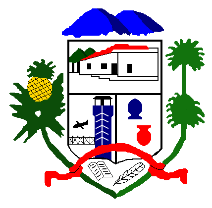 Escudo del municipio San Rafael de Carvajal, estado Trujillo, Venezuela